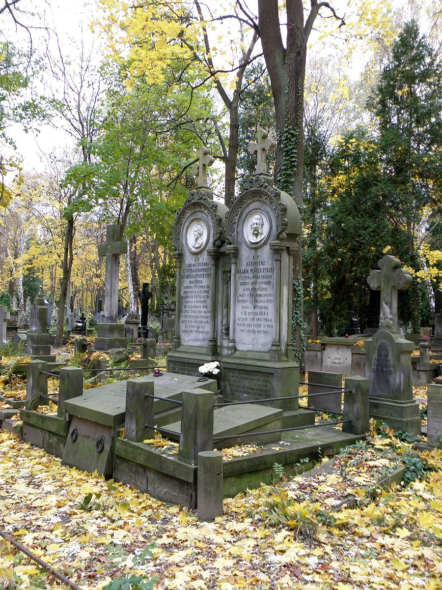 Grób Plater-Zyberków na Powąązkach